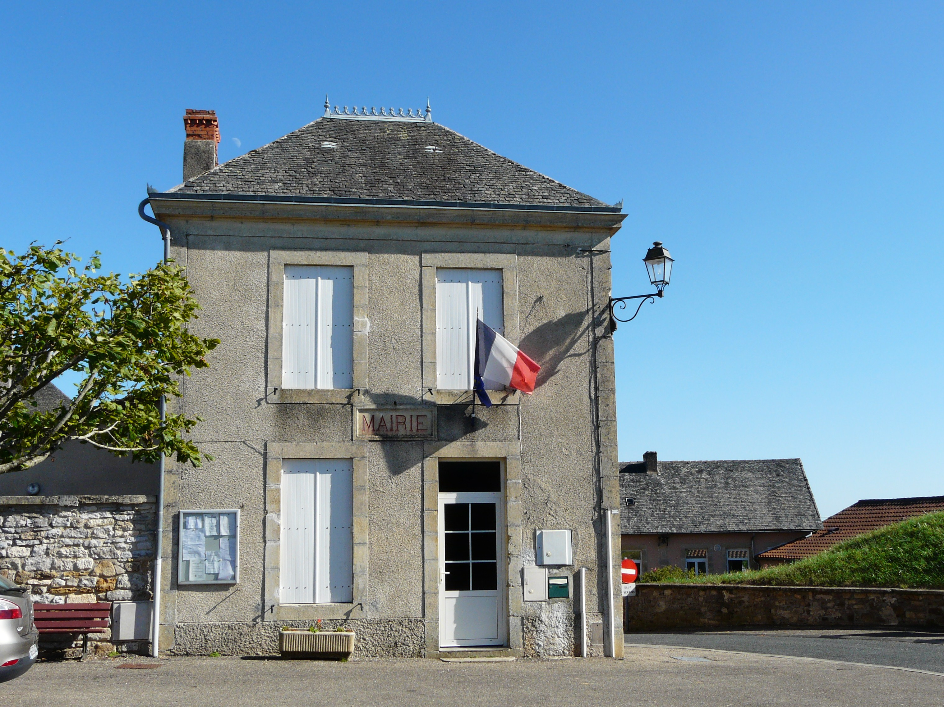 La mairie de Châtres, Dordogne, France.